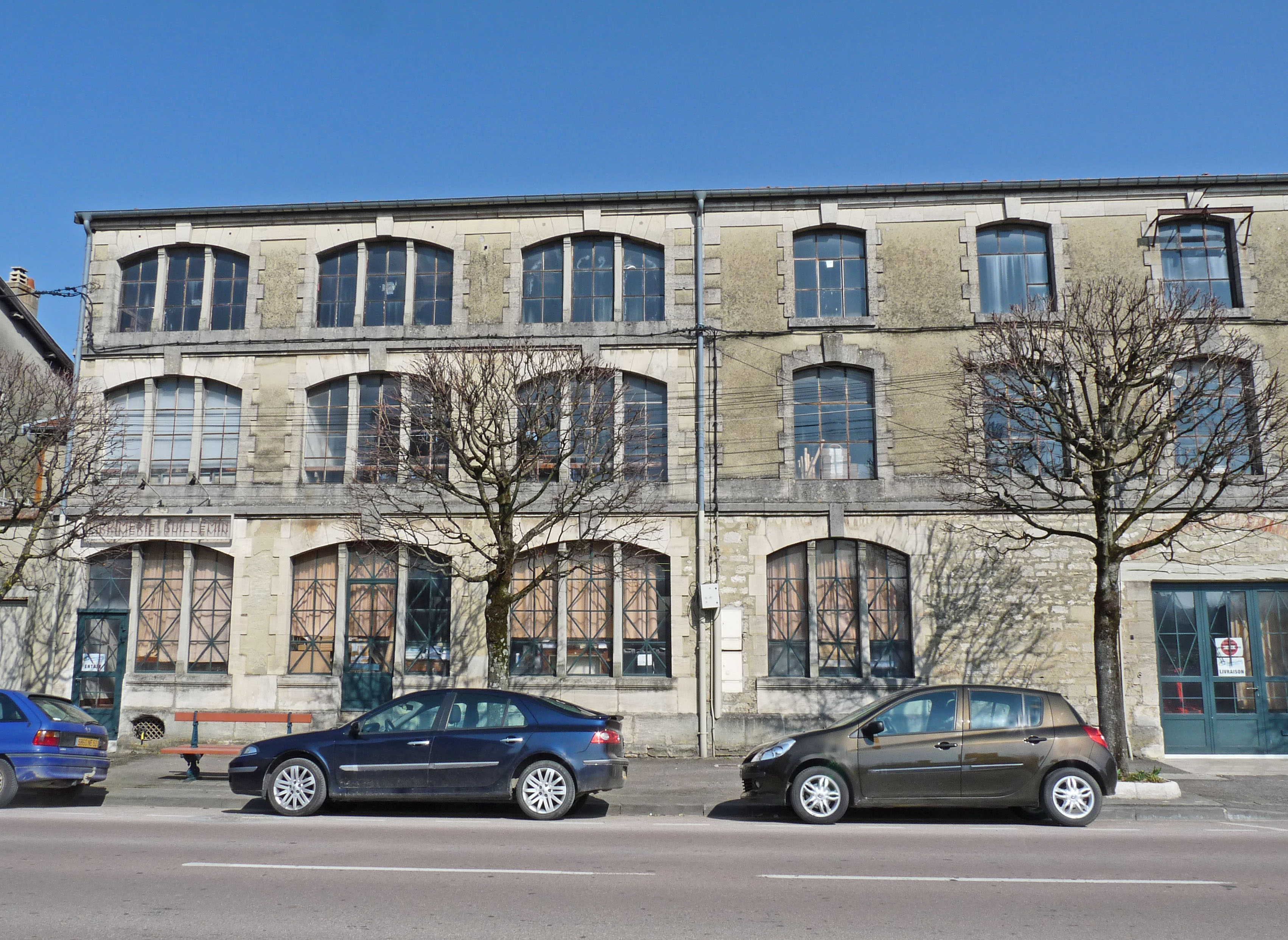 Imprimerie Guillemin, créée en 1833, à Wassy (Haute-Marne).